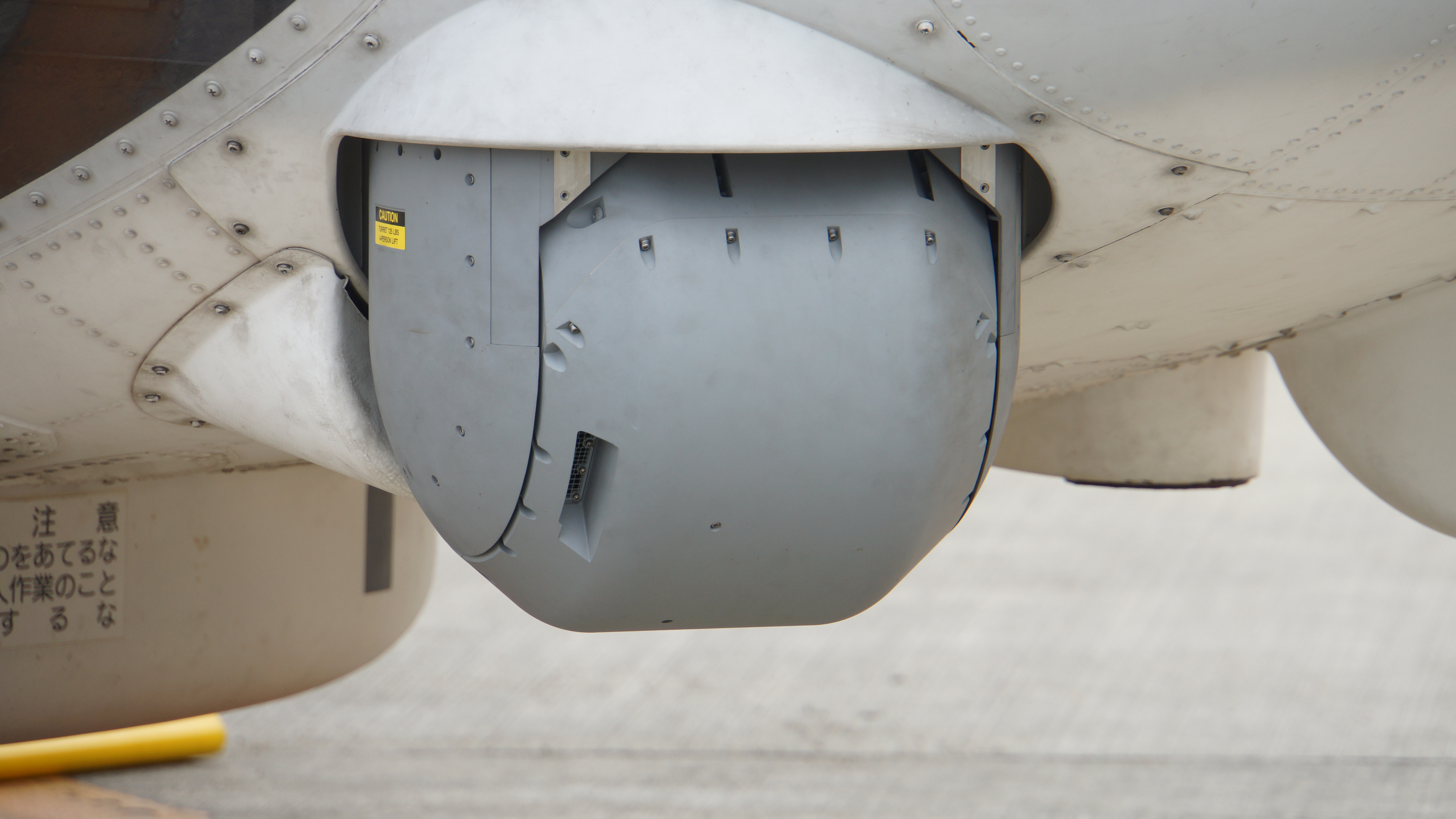 海上自衛隊 SH-60K哨戒ヘリコプター（8444号機） 機首右側AN/AAS-44-N1赤外線探知装置（FLIR）。2016年10月2日 陸上自衛隊明野駐屯地にて。